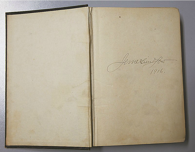 《十日談》，留有詹天佑的簽名。